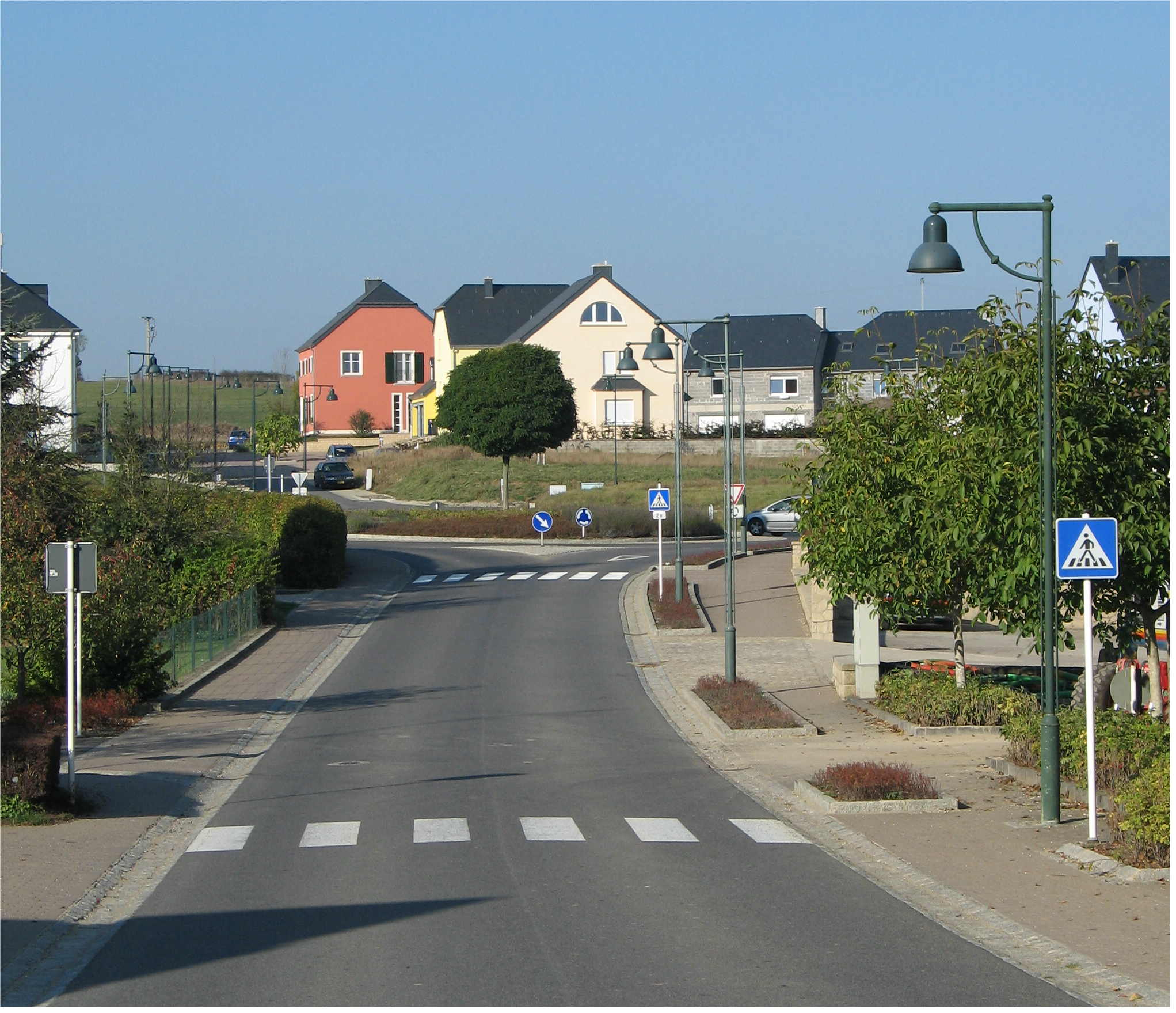 Schoulstrooss, Chrëschtnech.